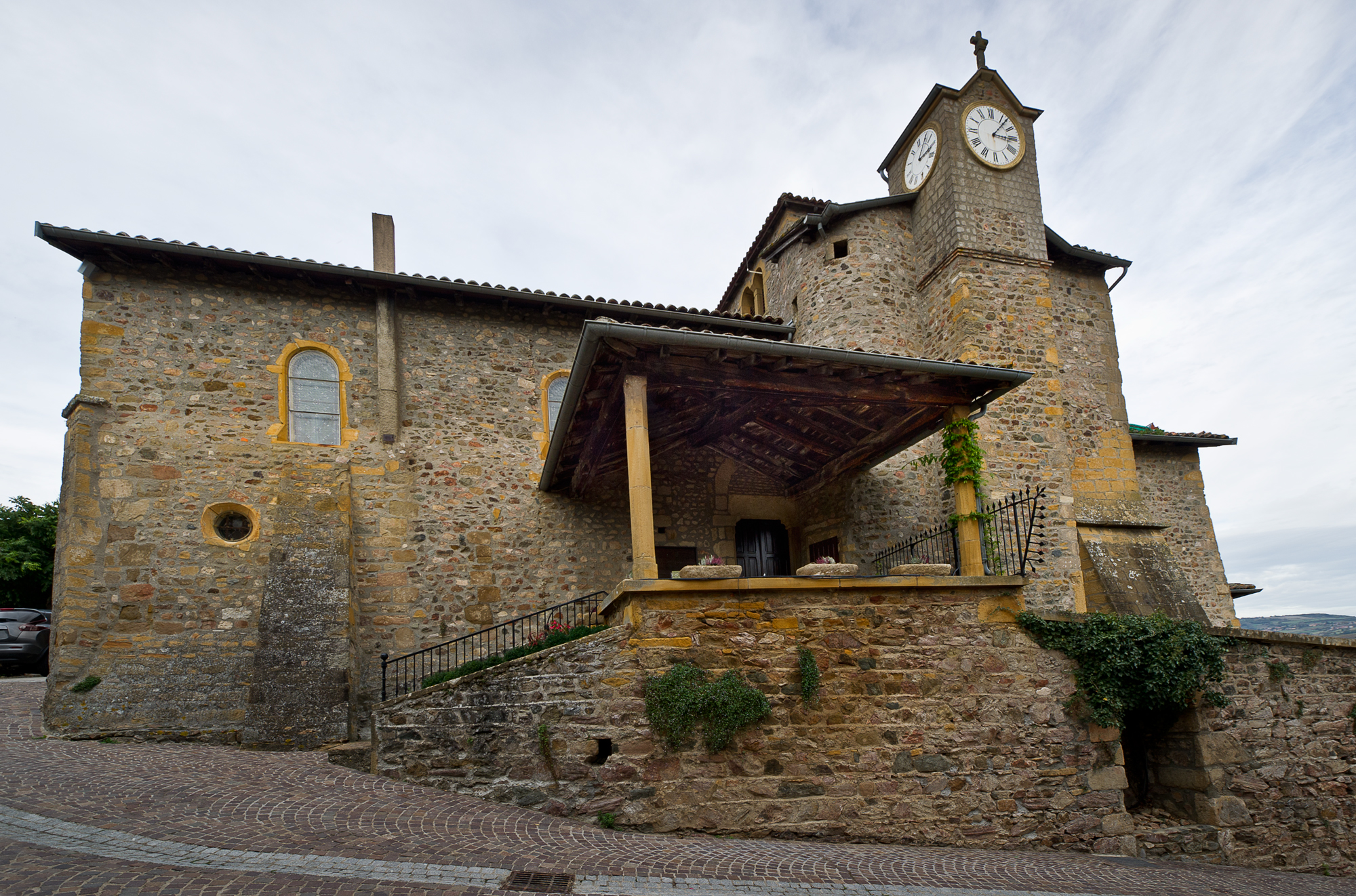 Église de la Nativité-de-Saint-Jean-Baptiste de Ternand, (Classé, 1951)